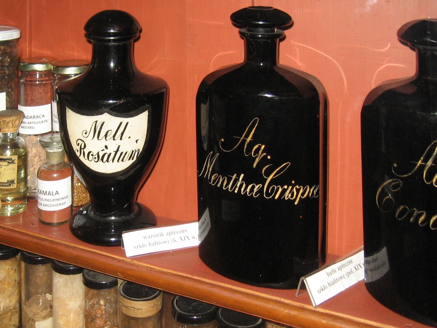 The pharmaceutical bottles made from hyalith glass, XIX century, Pharmacy Museum in Poznań.